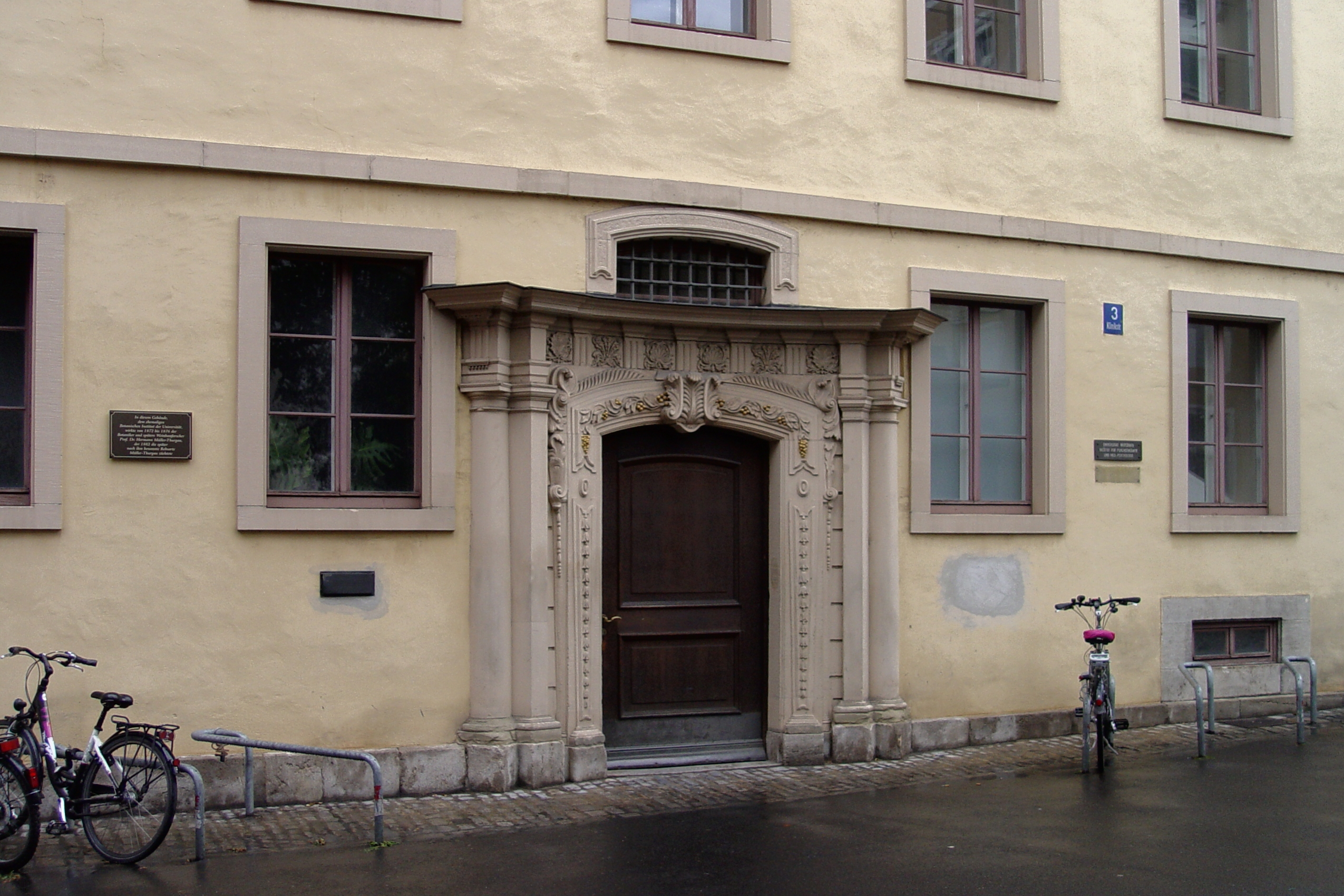 Würzburg-Altstadt, Eingangsbereich des ehemaligen botanischen Instituts an dem auch der Weinkundler Müller aus Thurgau promovierte, heute Abteilung für Medizinische Psychologie und Psychotherapie, Medizinische Soziologie und Rehabilitationswissenschaften der Universität WürzburgThis is a photograph of an architectural monument.